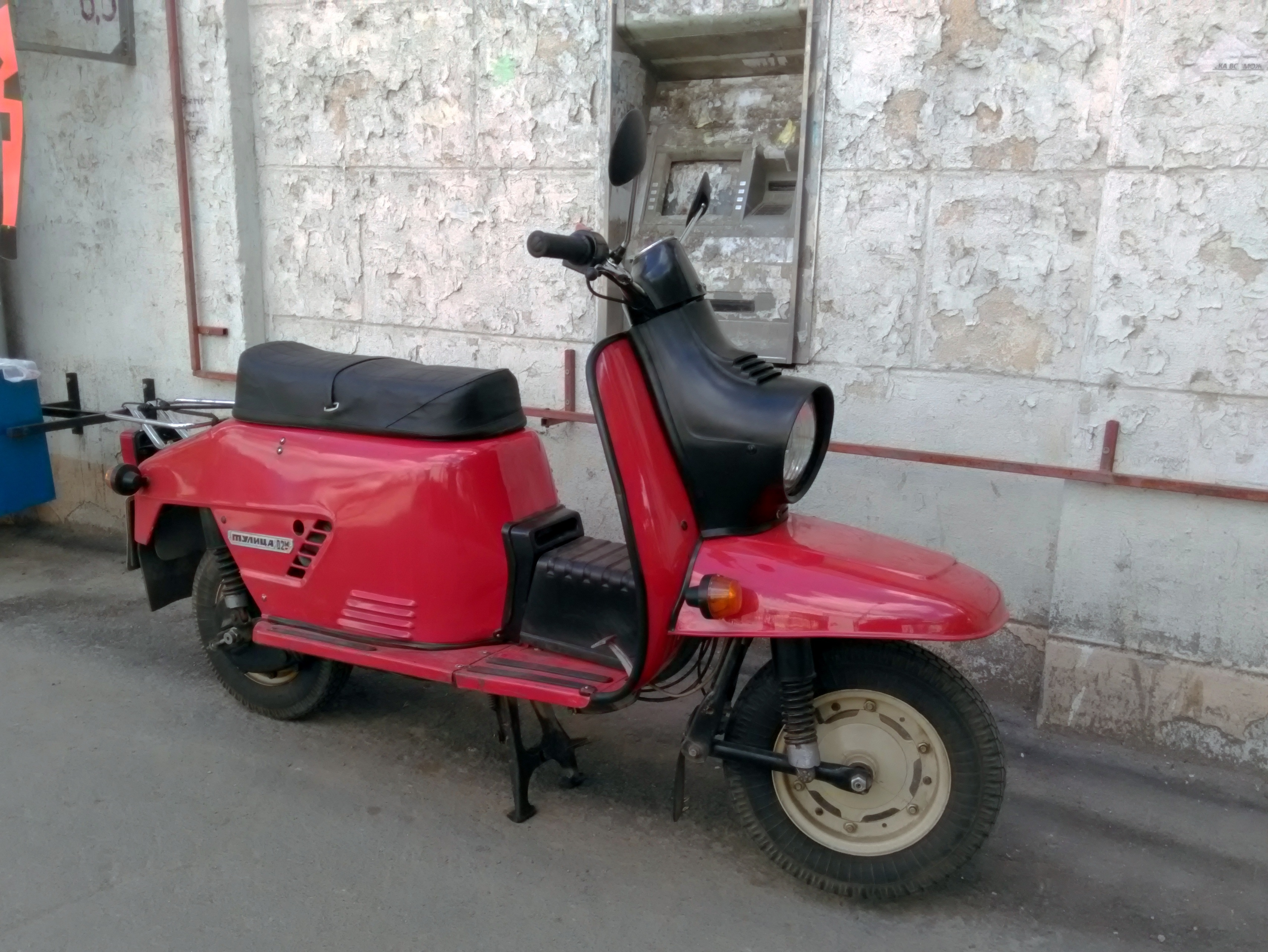 мотороллер Тулица-02М